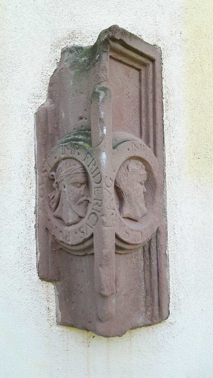 remploi du château Renaissance sur la façade nord